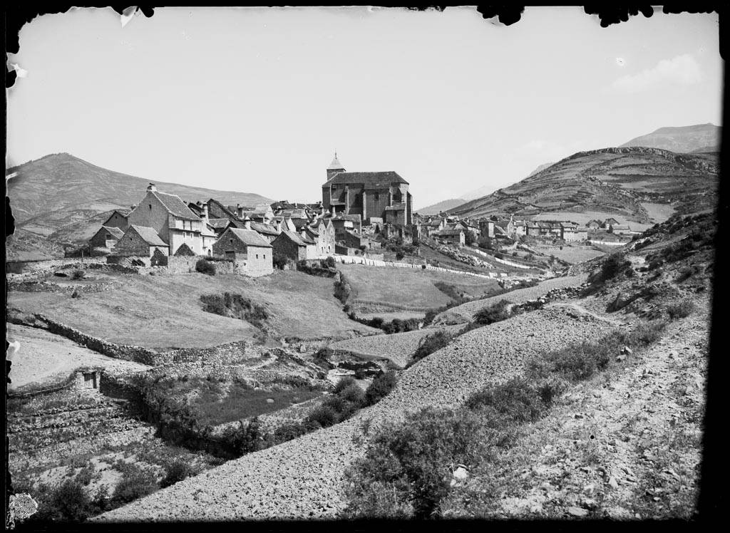 Imatge